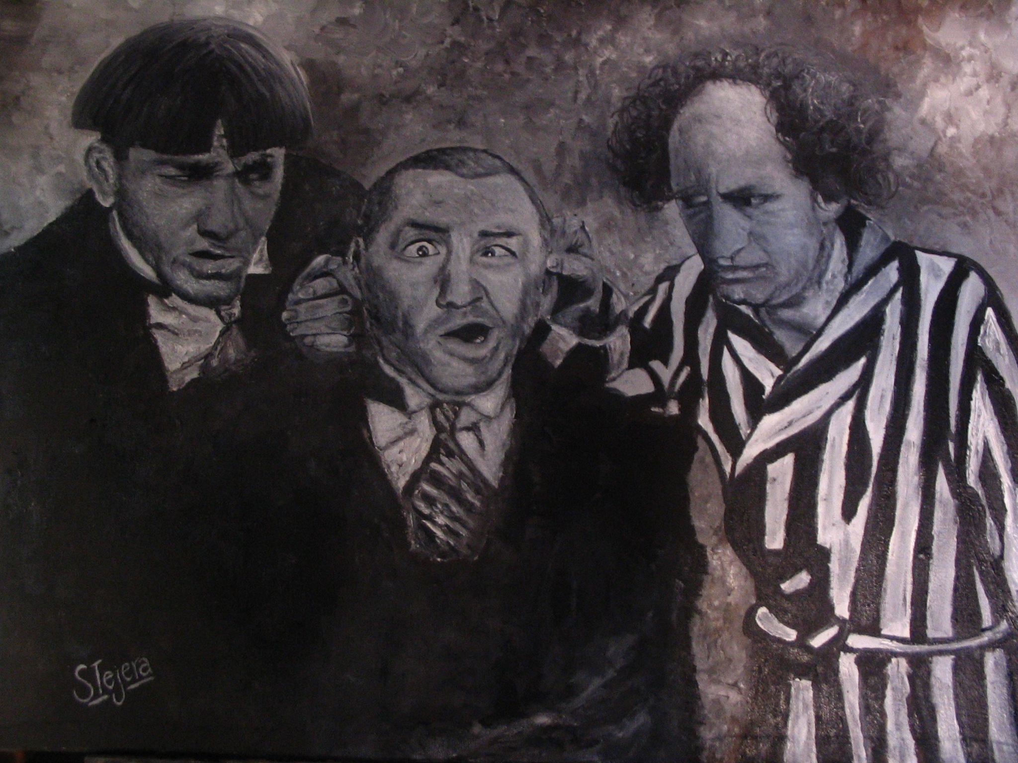 Obras realizadas sobre fibra entelada en óleos blanco y negro, simulando fotos antiguas.